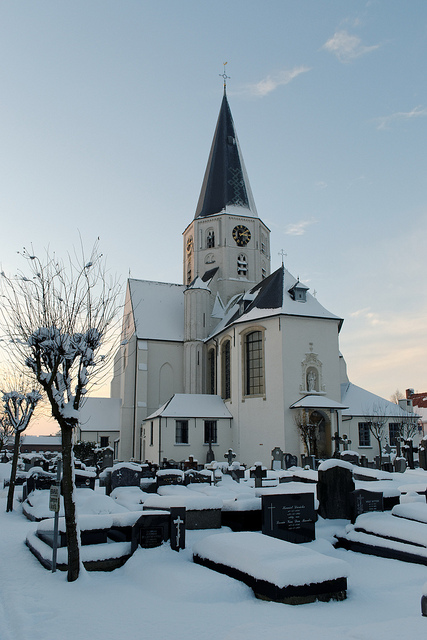 Bassevelde OLV-kerk